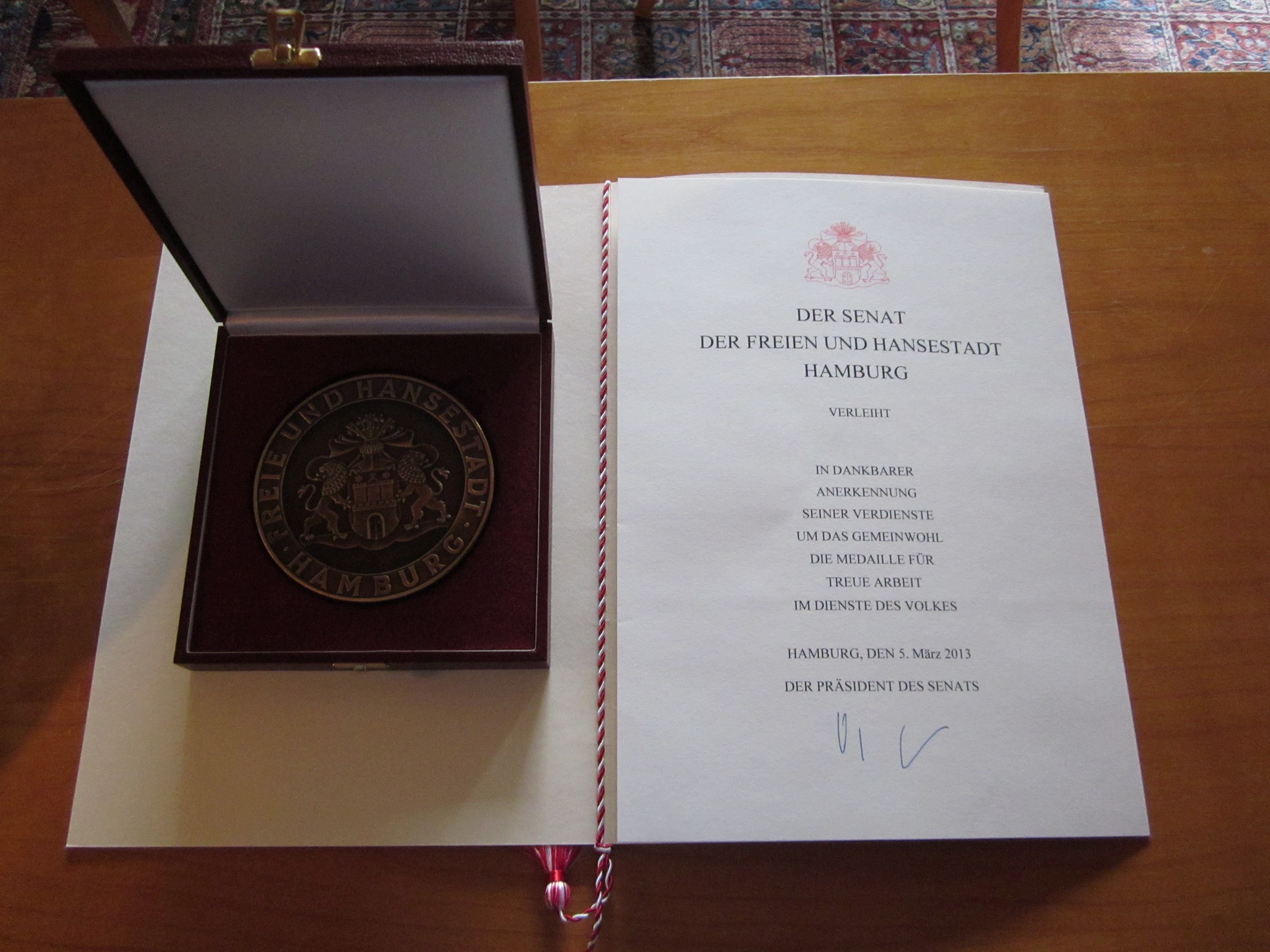 Medaille für Treue Arbeit im Dienste Volkes in ihrer Kassette und mit der dazu gehörenden Urkunde (mit Unterschrift von Olaf Scholz).